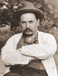 Чикаленко Евгений Харлампиевич - украинский общественный деятель